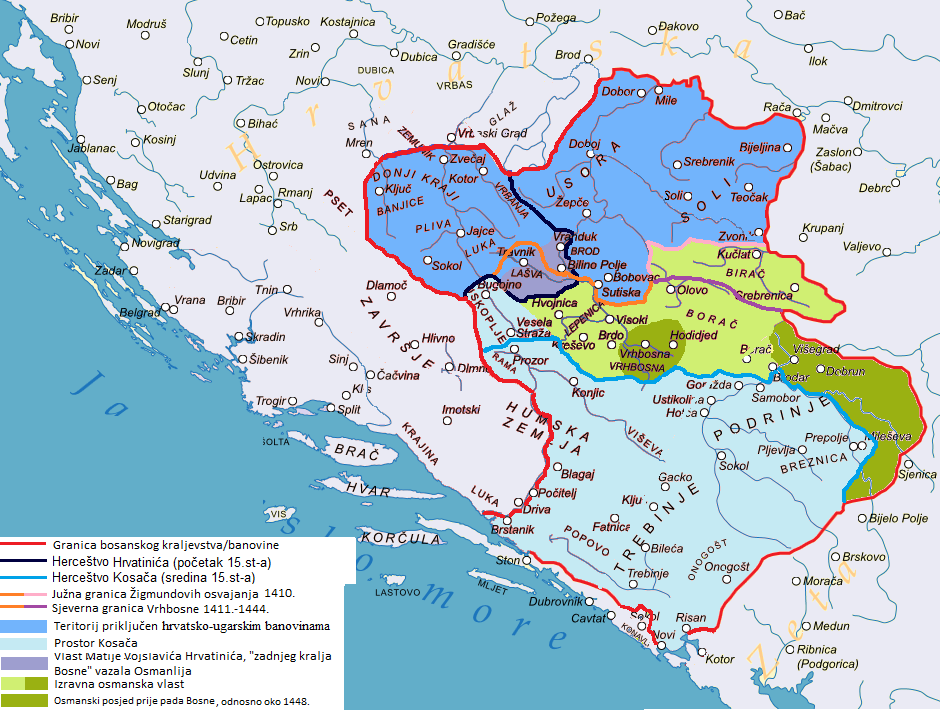 Pad Bosne, obranbene banovine nakon njezina pada File:Realms_of_Hrvatinići.png